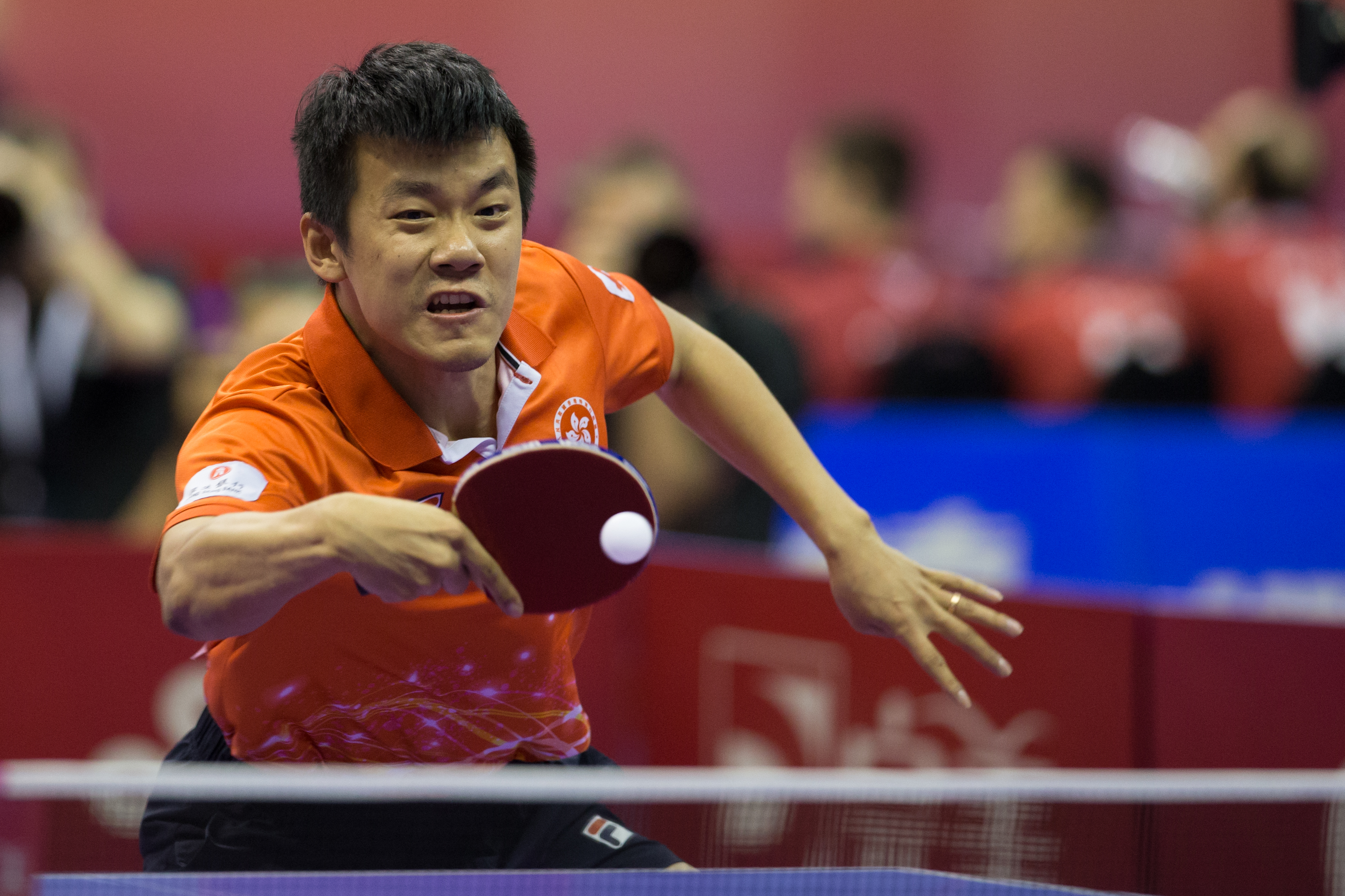 _K0K9360